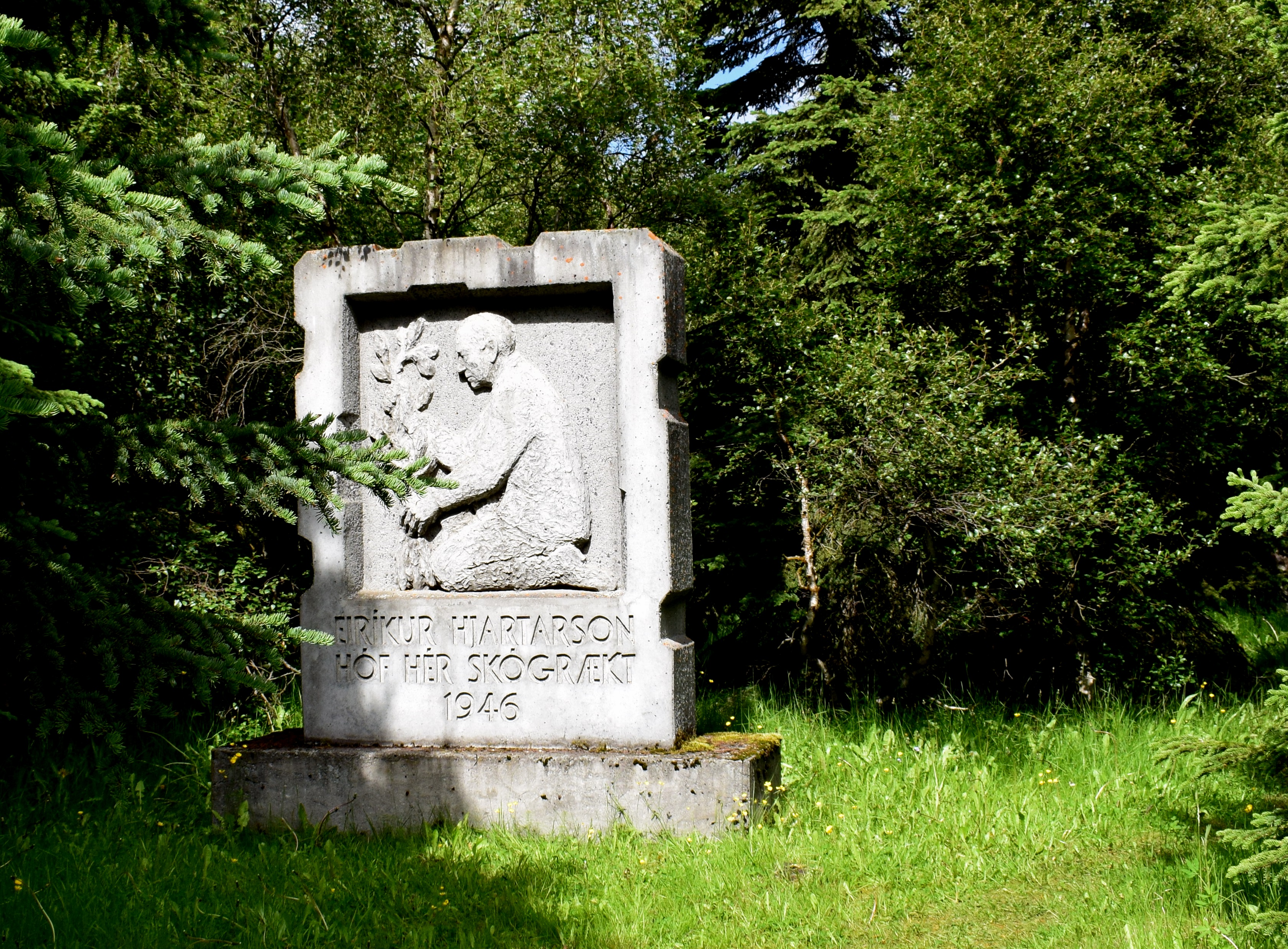 Minnismerki um Eirík Hjartarson í Hánefsstaðaskógi